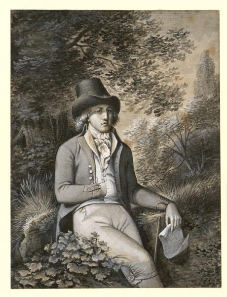 André Chénier, disegno, 20.4 x 15.5 cm, Angers, Musée des beaux-arts